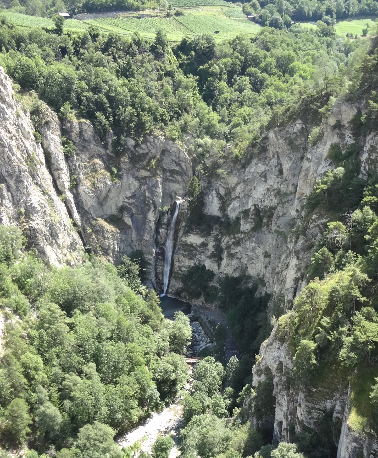 Chute de Tourtemagne vue depuis le téléphérique Tourtemagne-Oberems (Turtmann-Oberems, LTUO).